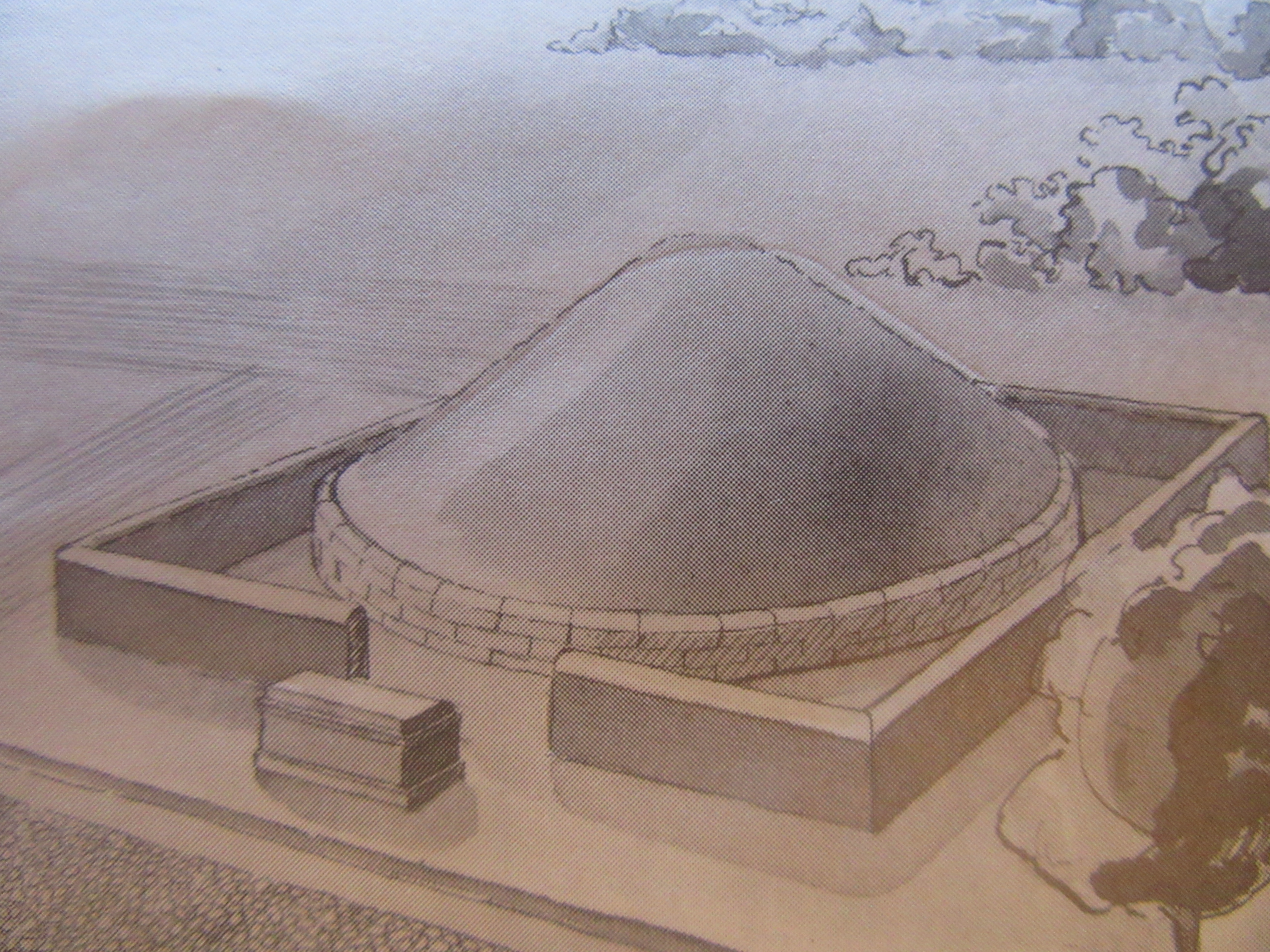 reconstitution tumulus de Penteville